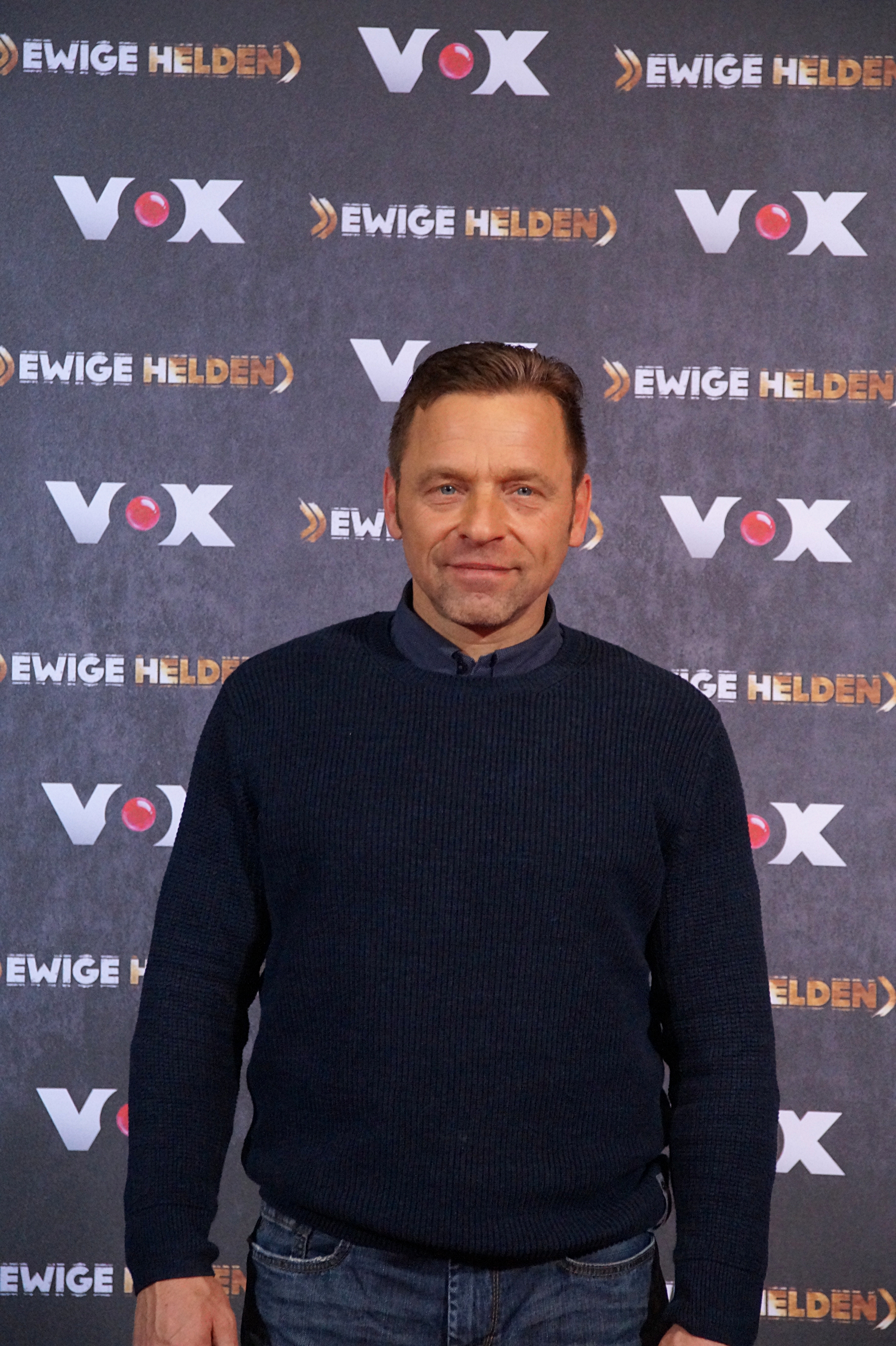 Thomas Häßler beim VOX "Ewige Helden" Pressetermin, im Dezember 2015.